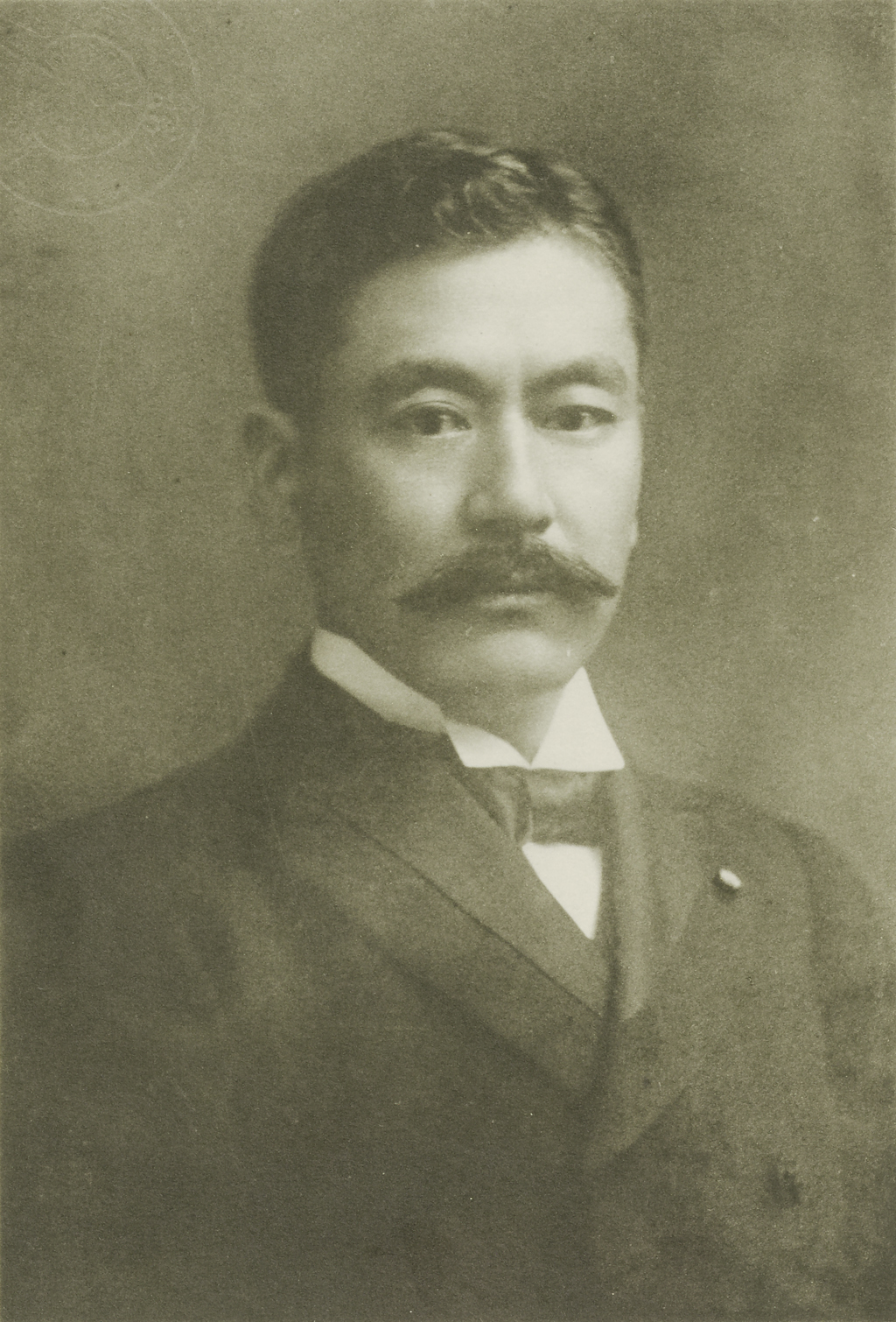 Portrait of Tsuzuki Keiroku (都筑馨六, 1861 – 1923)